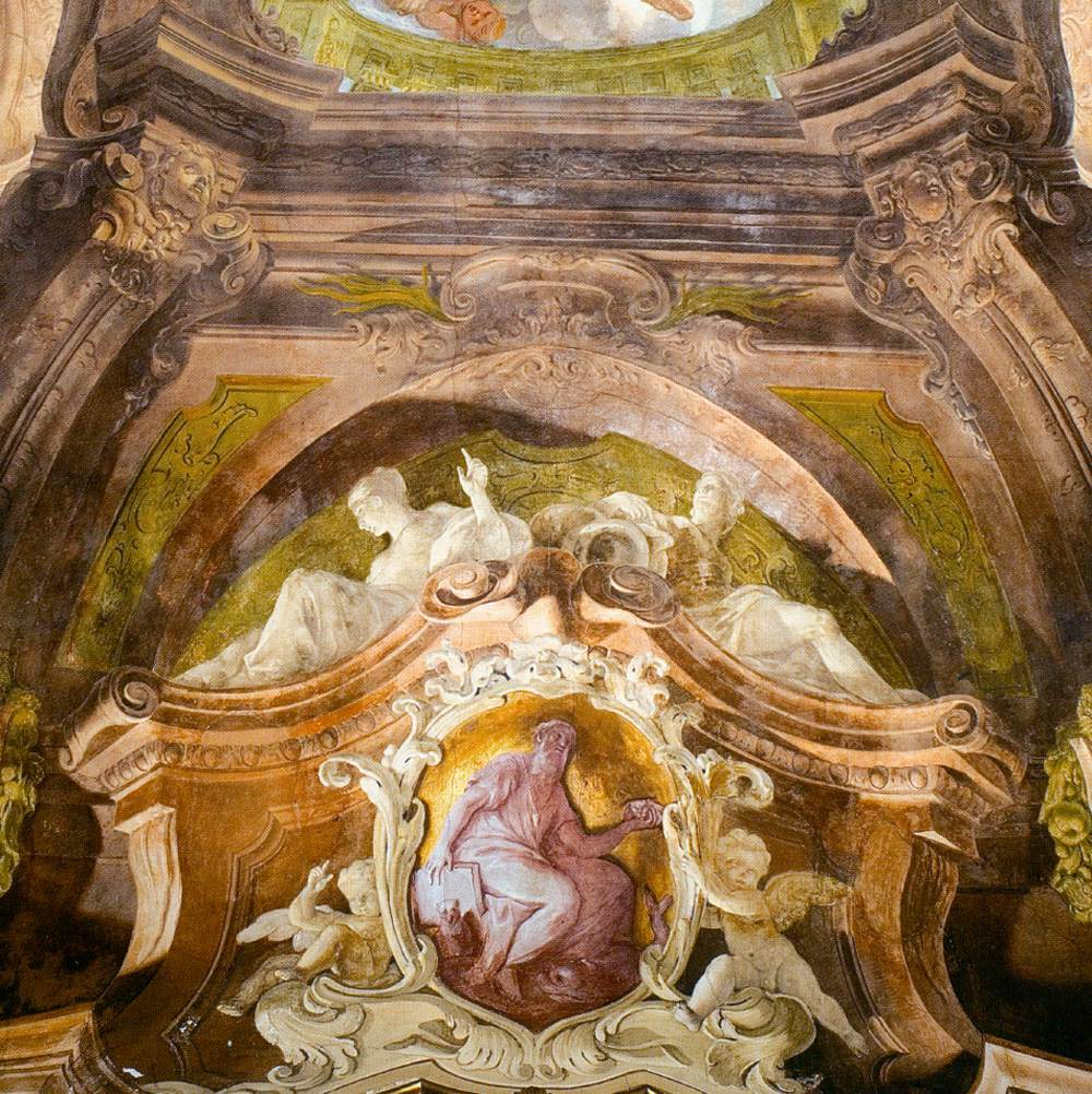 Particolare della quadratura di Antonio Felice Ferrari. Sopra il timpano personificazioni di fiumi. Nell'ovale allegoria del Consiglio sommità dell'incorniciatura destinata al Trionfo di Mario di Tiepolo